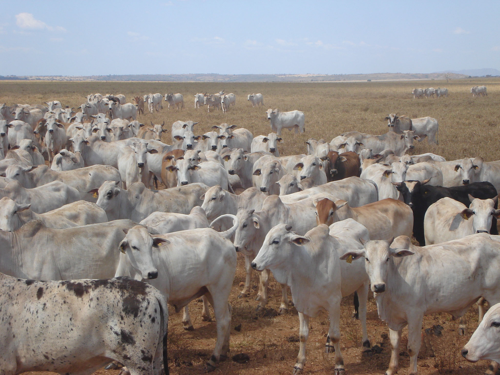 Bezerrada padronizada é um dos resultados da IATF